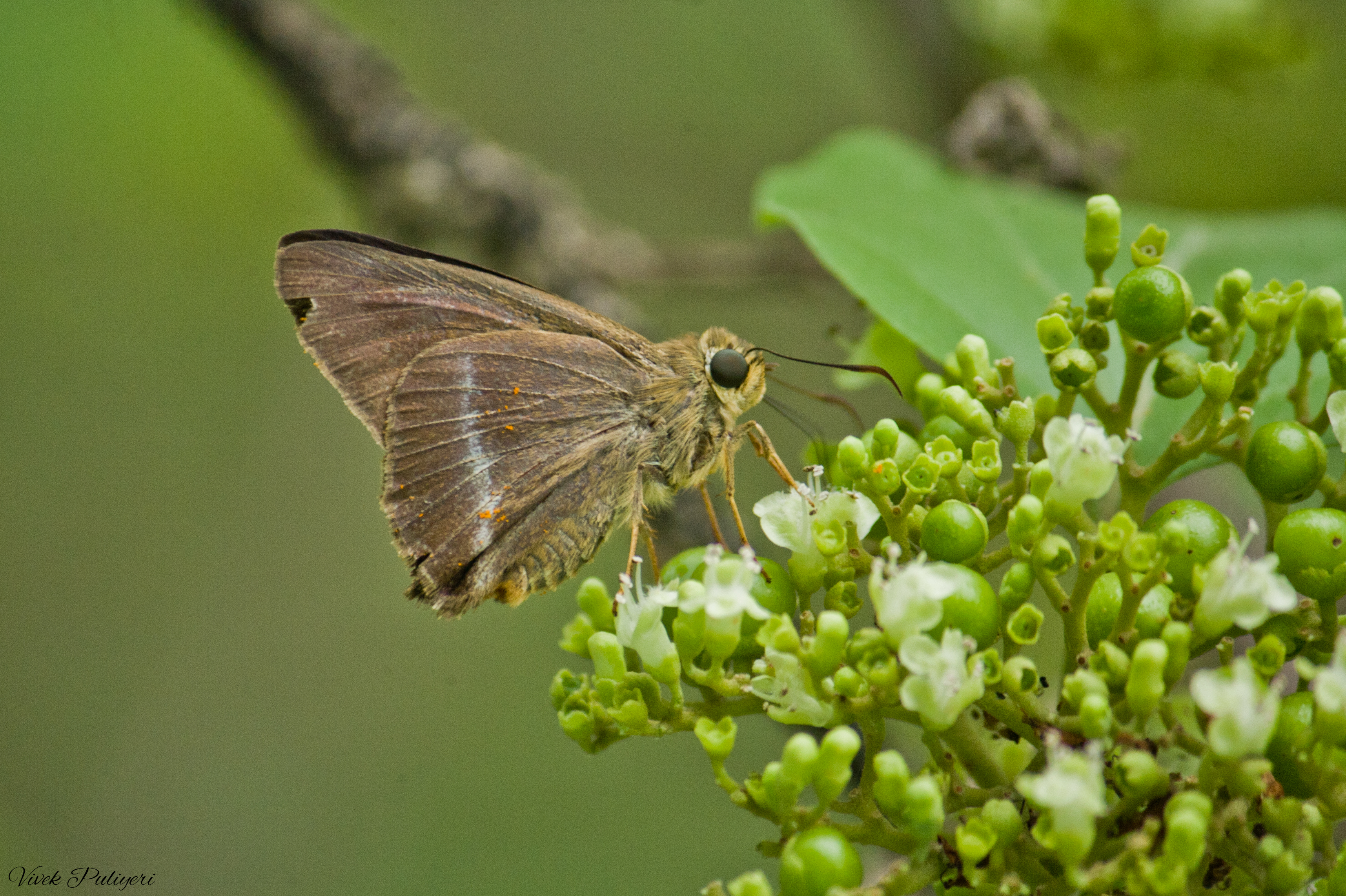 Common Banded Awl @ IITM